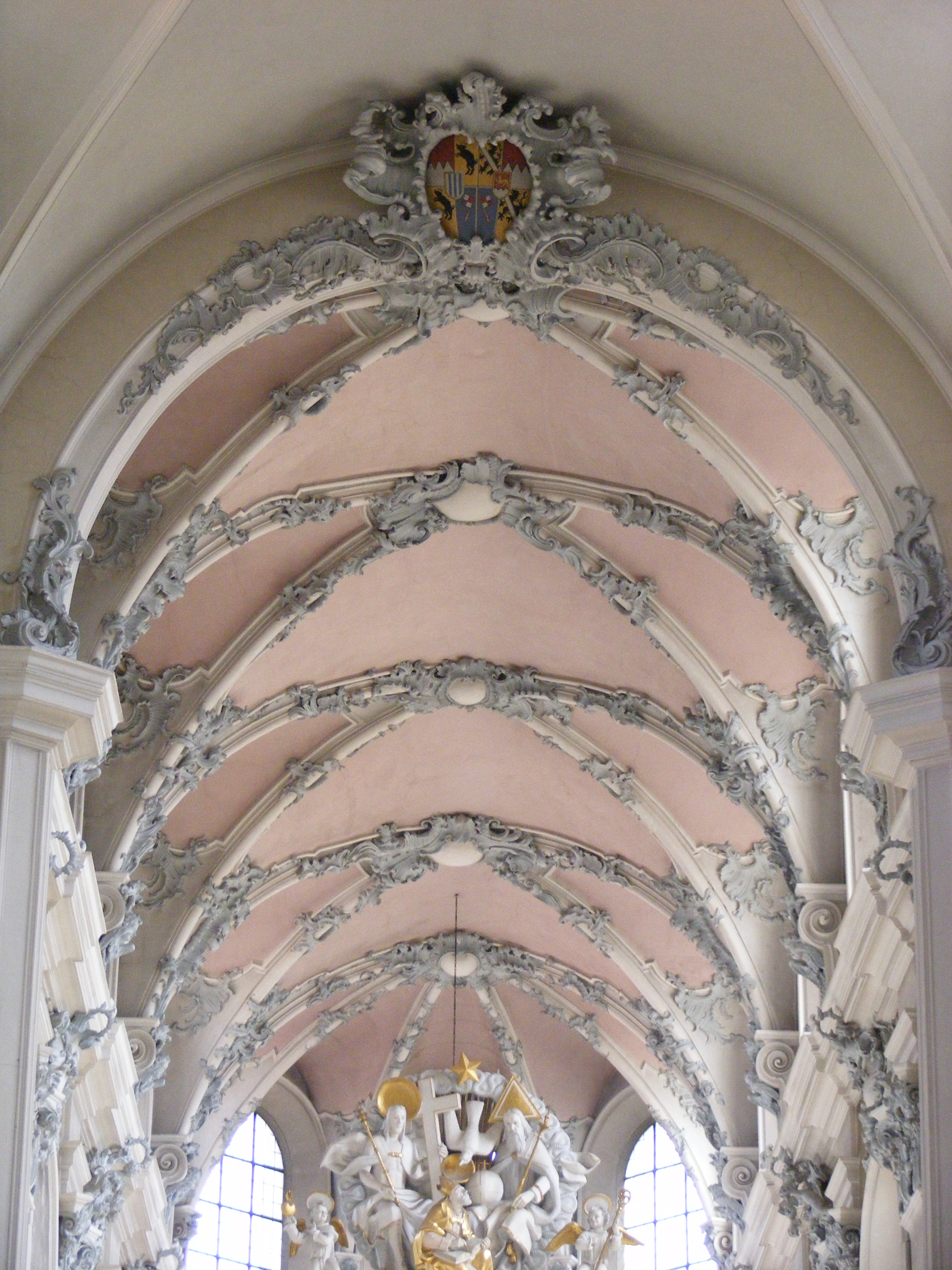 Würzburg - Augustinerkirche innen (Decke, Blick zum Altar).